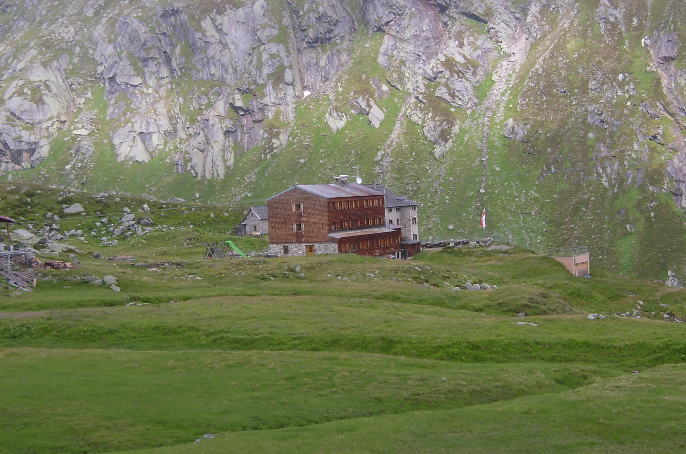 Die Essener-Rostocker-Hütte am Talboden des Maurertales in der Venedigergruppe.